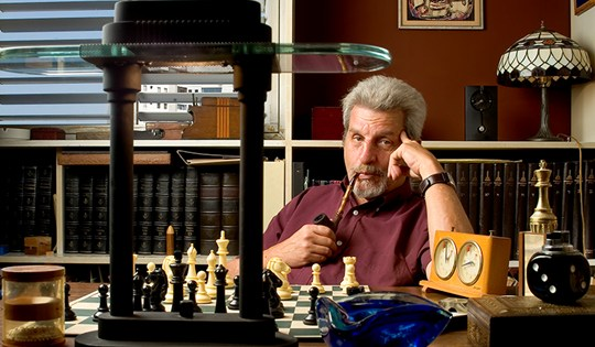 פרופסור לפיזיקה יקיר אהרונוב